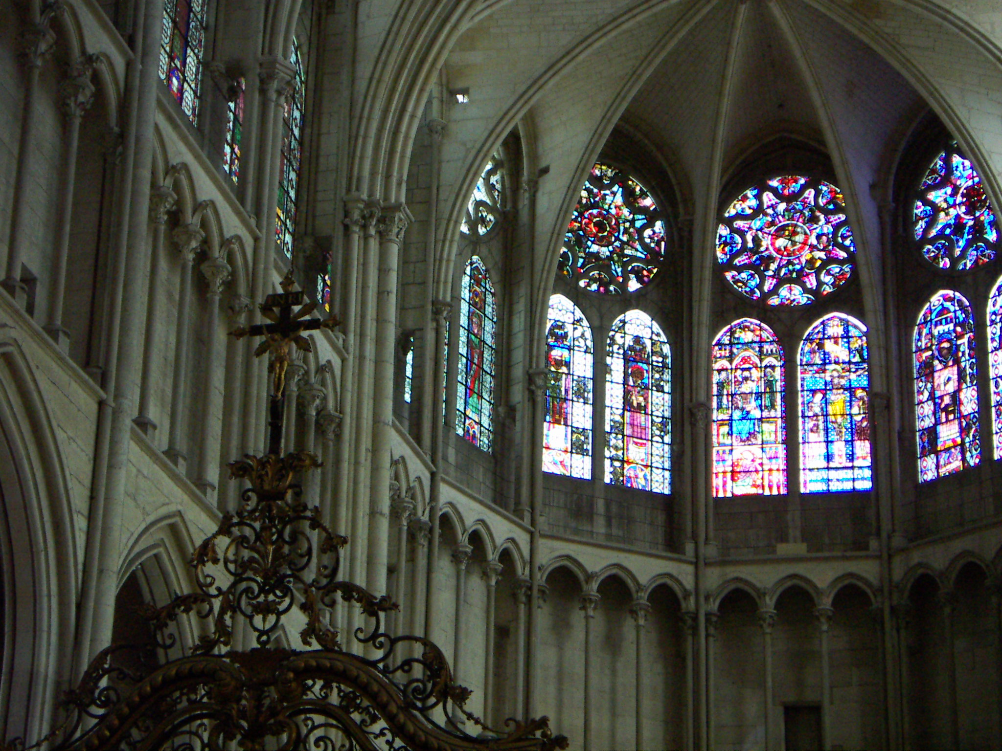 Auxerre, Kathedrale Saint-Étienne, Chor